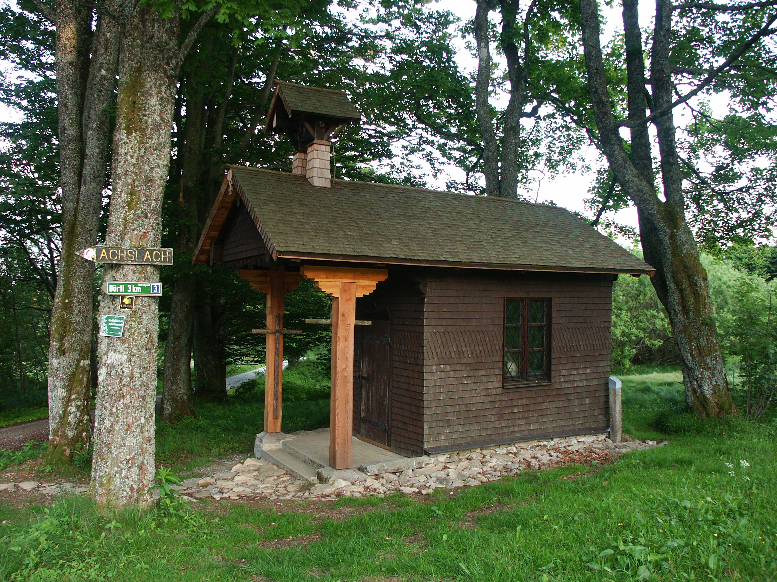 Kapelle auf der Ödwies (1030m) in der Gemeinde Achslach